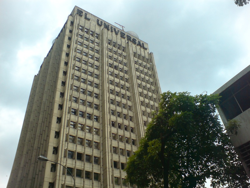 El Universal Building, Caracas, Venezuela.